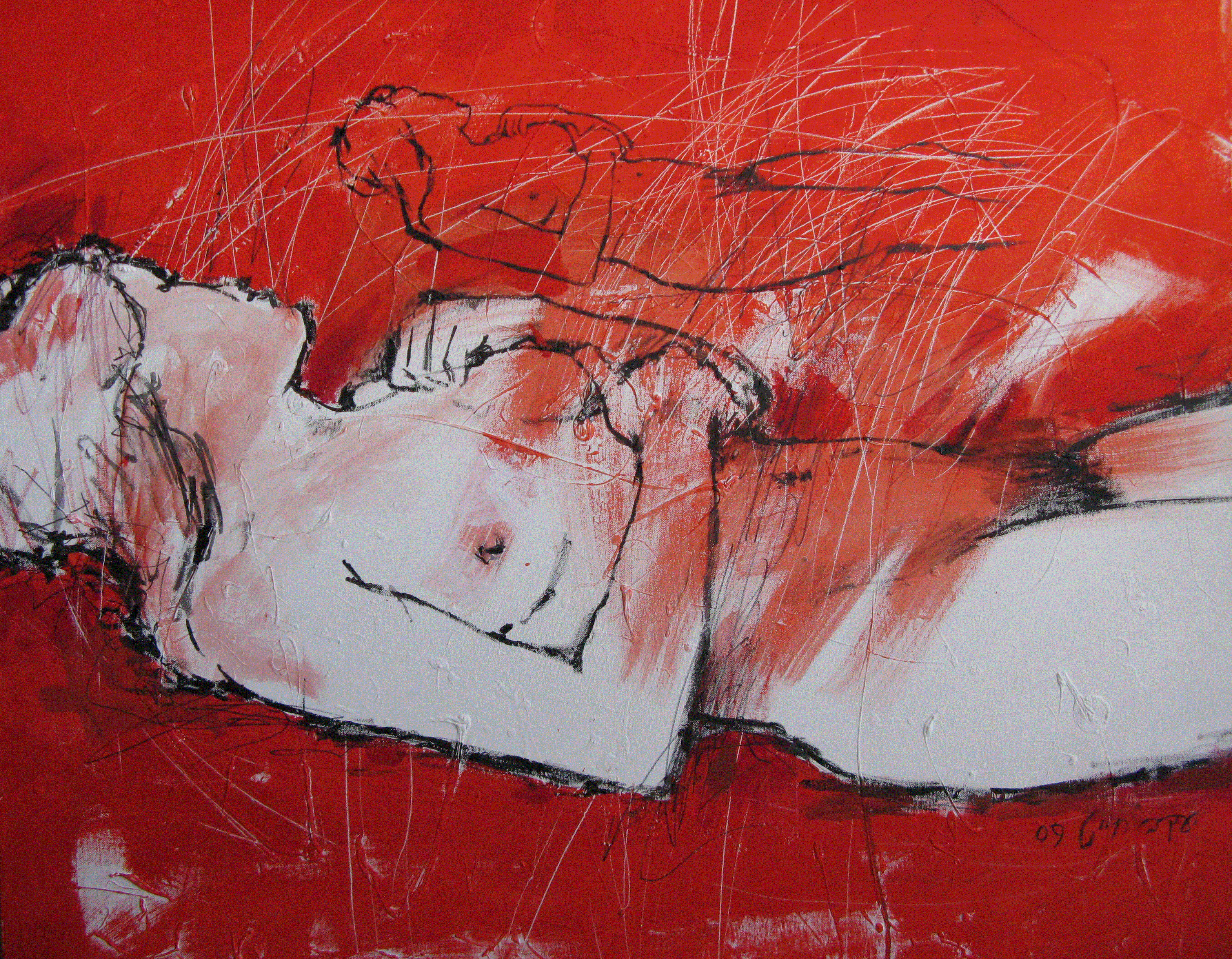 ערום באדום, יעקב חייט